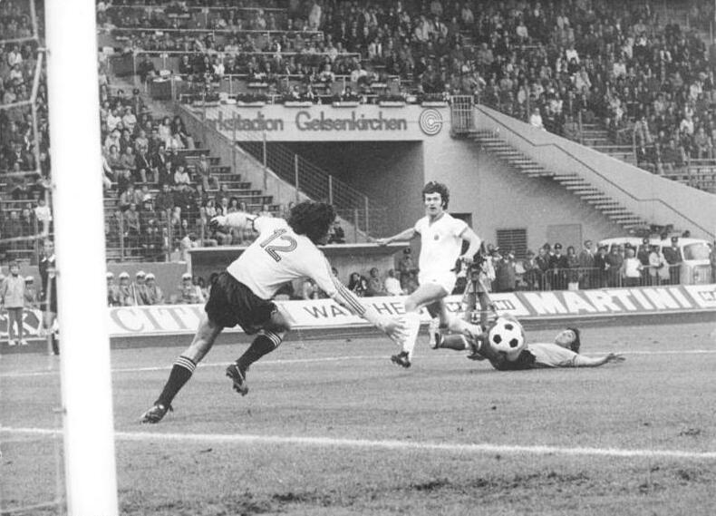 ADN-ZB-Mittelstädt-3.7.74-ma-BRD-Gelsenkirchen: X. Fußball-Weltmeisterschaft-2. Finalrunde, Gruppe A: Argentinien - DDR 1:1- DDR-Stürmer Wolfram Löwe (Mitte) hat einen argentinischen Abwehrspieler (am Boden) das Nachsehen gegeben und auf das Tor geschossen. Torwart Ubaldo Matildo Fillol (links) verkürzt den Winkel, doch der Ball geht am argentinischen Gehäuse vorbei ins Aus.